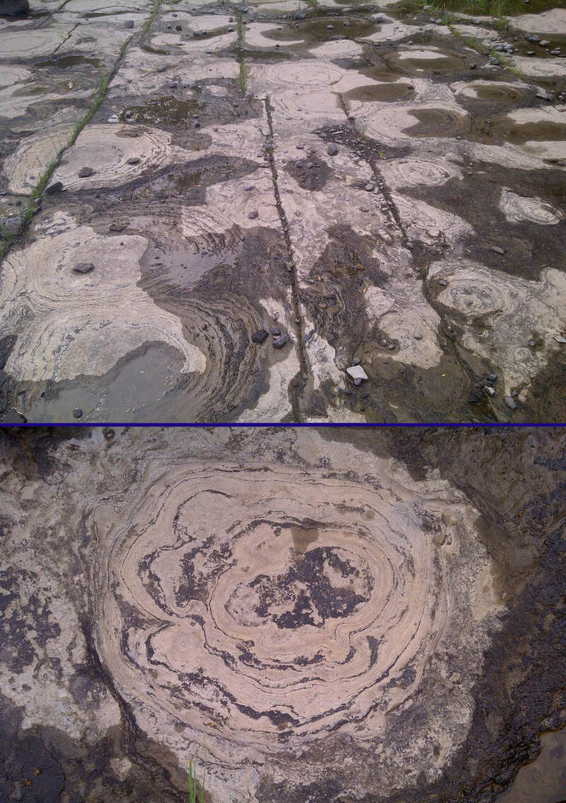 Stromatolite, Rivière des Outaouais